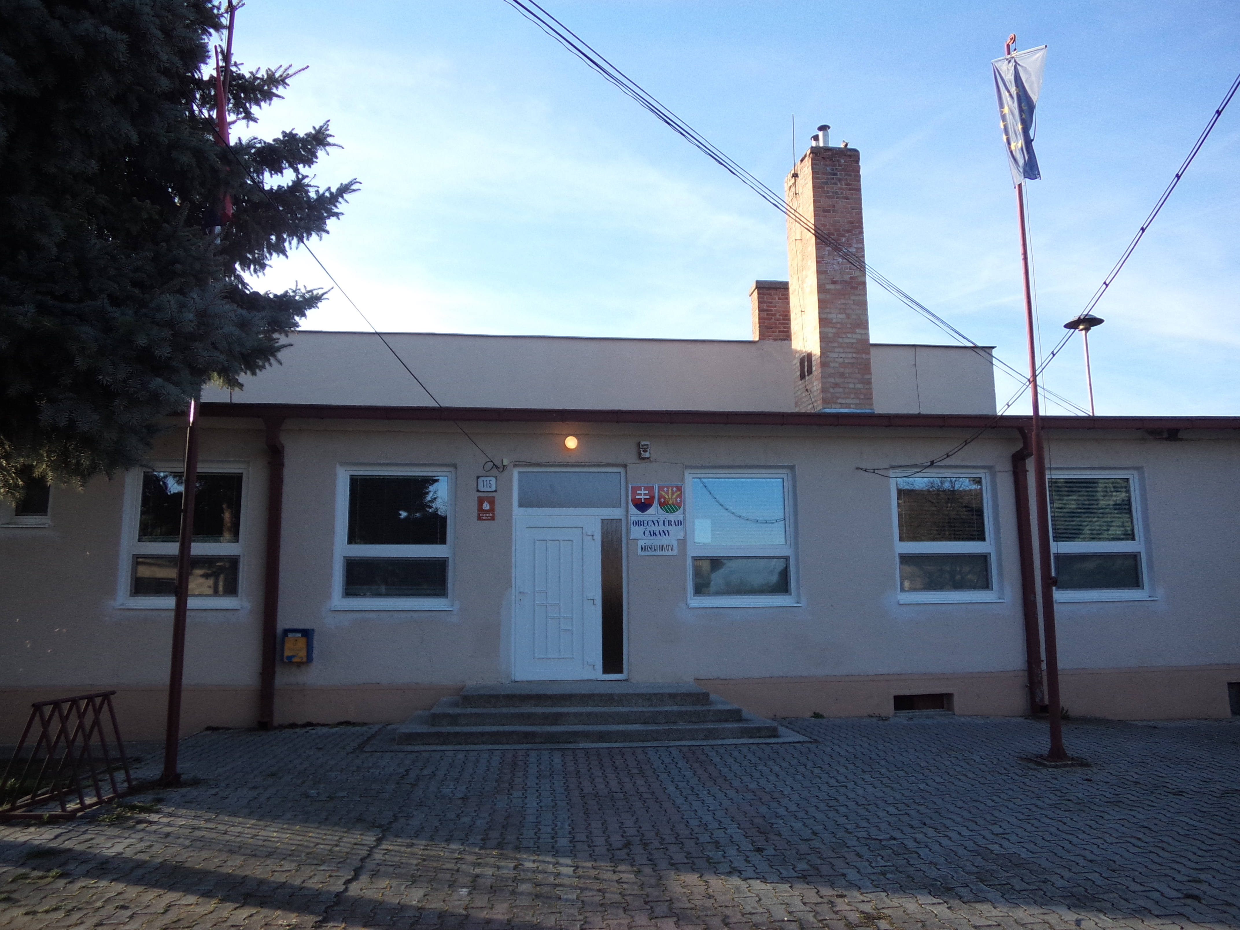 Pozsonycsákány